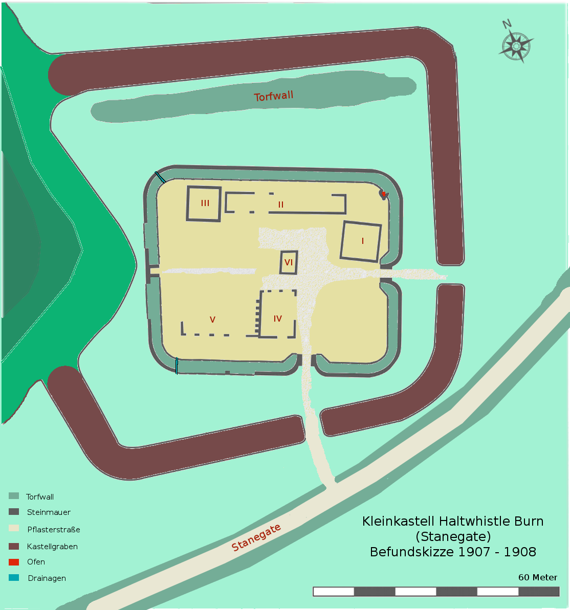 Befundskizze, Grabungen 1907 - 1908, des Kleinkastell Haltwhistle Burn am Stanegate (GB).